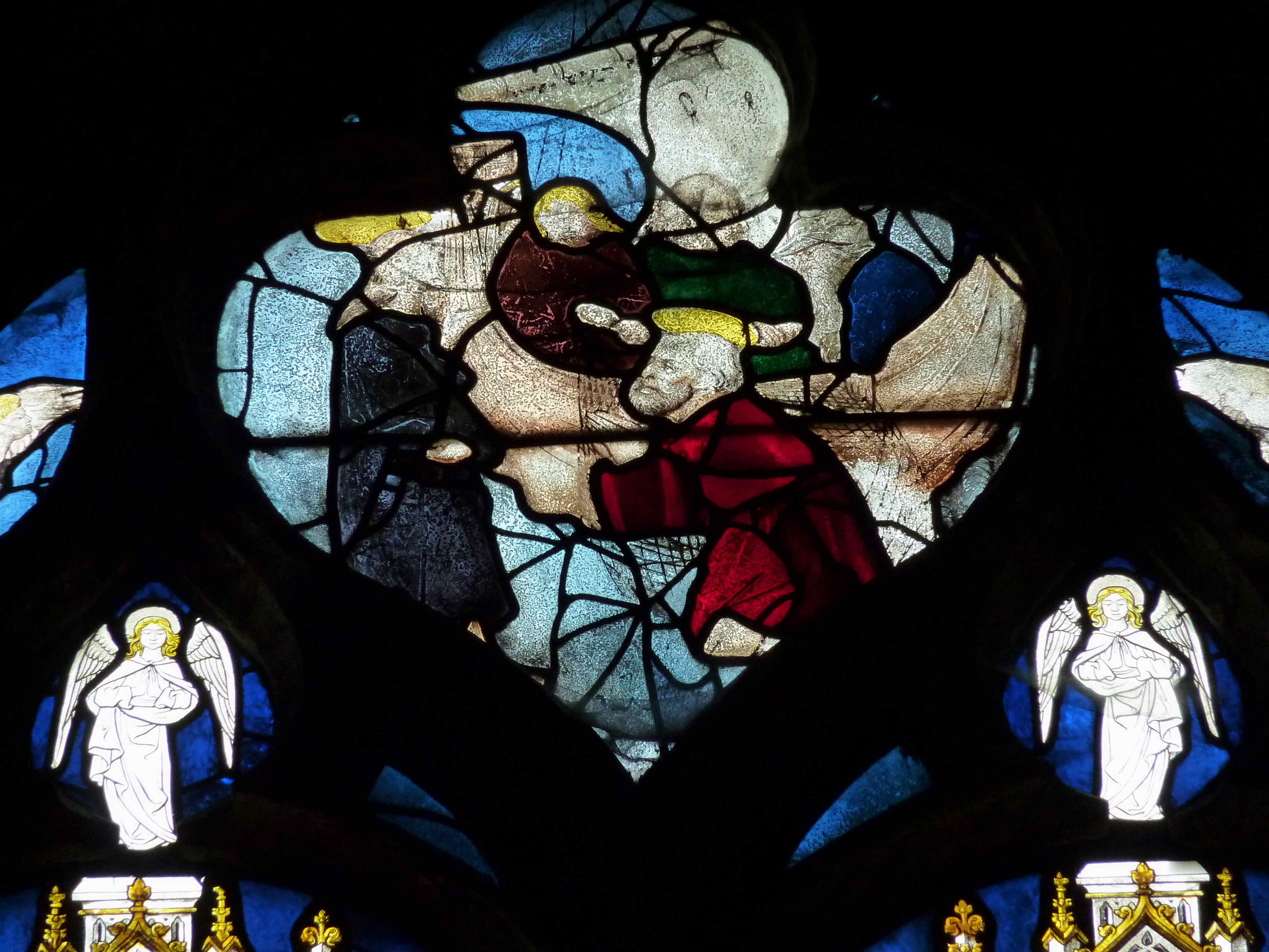 Katholische Kirche Saint-Pierre in Dreux im Département Eure-et-Loir (Centre-Val de Loire/Frankreich), Bleiglasfenster in der Kapelle Notre-Dame de Pitié; Darstellung: Szenen aus dem Leben Marias; Fragment eines älteren Fensters im Maßwerk: Jesus geht über das Wasser (Ausschnitt)